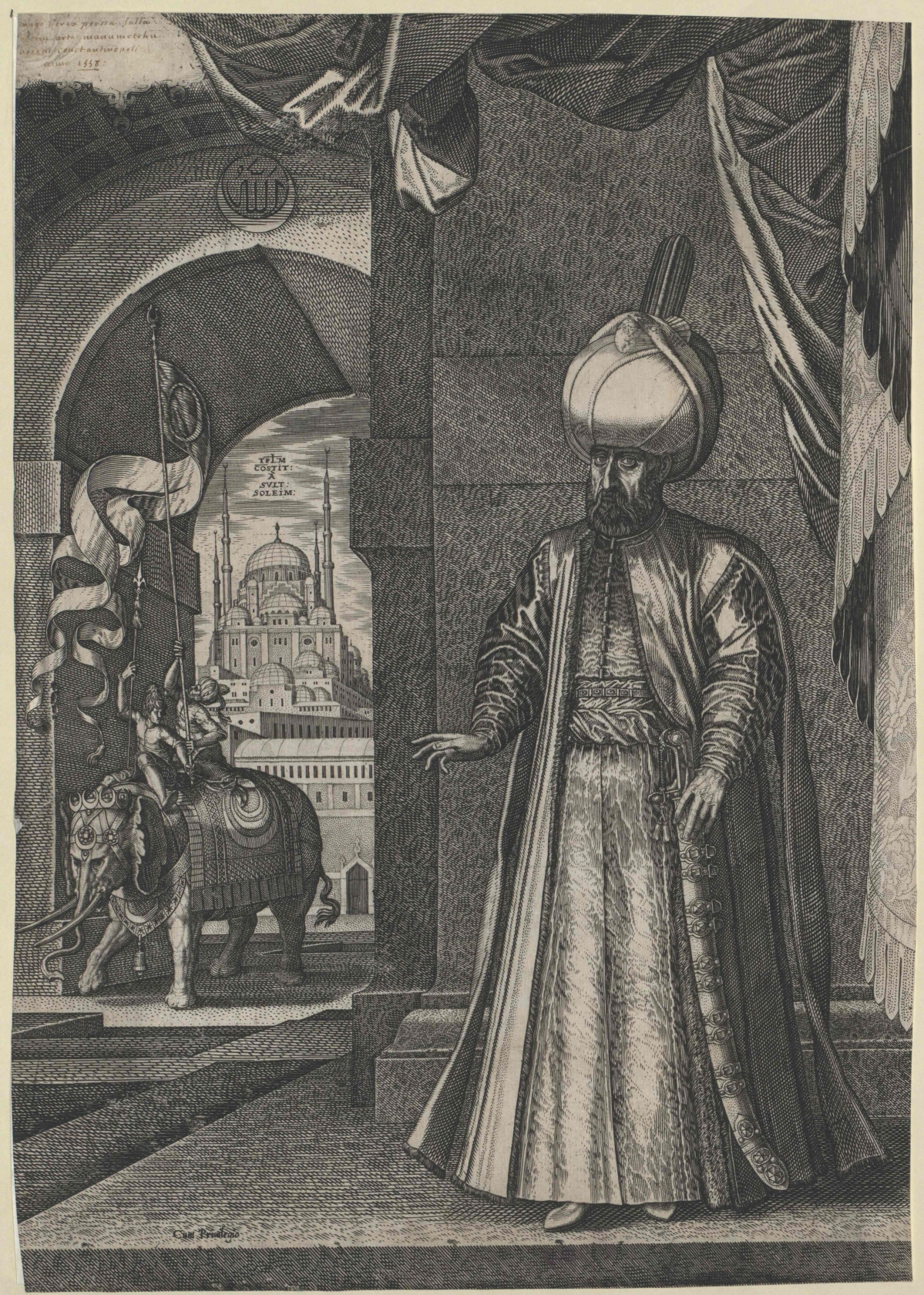 Kanuni